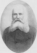 Sergei Urussow, Photographie aus dem 19. Jh.